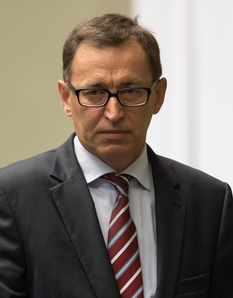 Jarosław Szarek w Sejmie